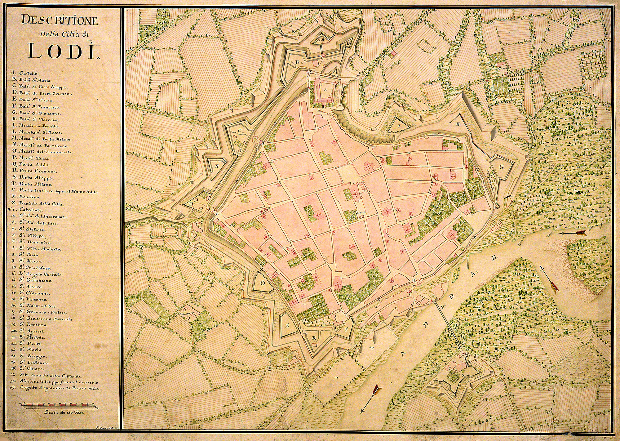 Pianta della città di Lodi